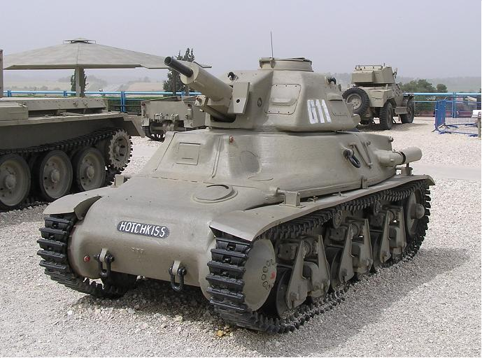 טנק הוצ'קיס. צולם על ידי ביד לשריון בלטרון.